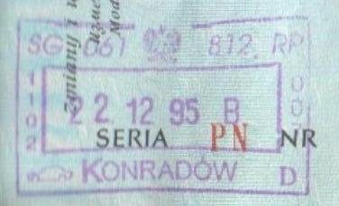 Stempel polskiej kontroli granicznej w drogowym przejściu granicznym Konradów